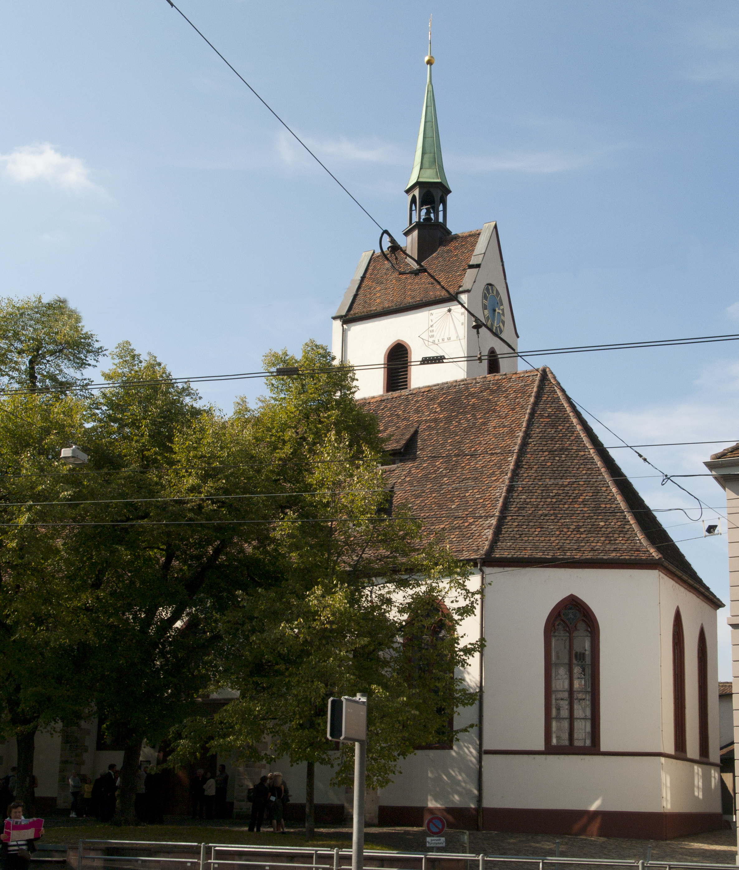 Riehen (Kanton Basel-Stadt), Dorfkirche, Ansicht von der Baselstrasse her